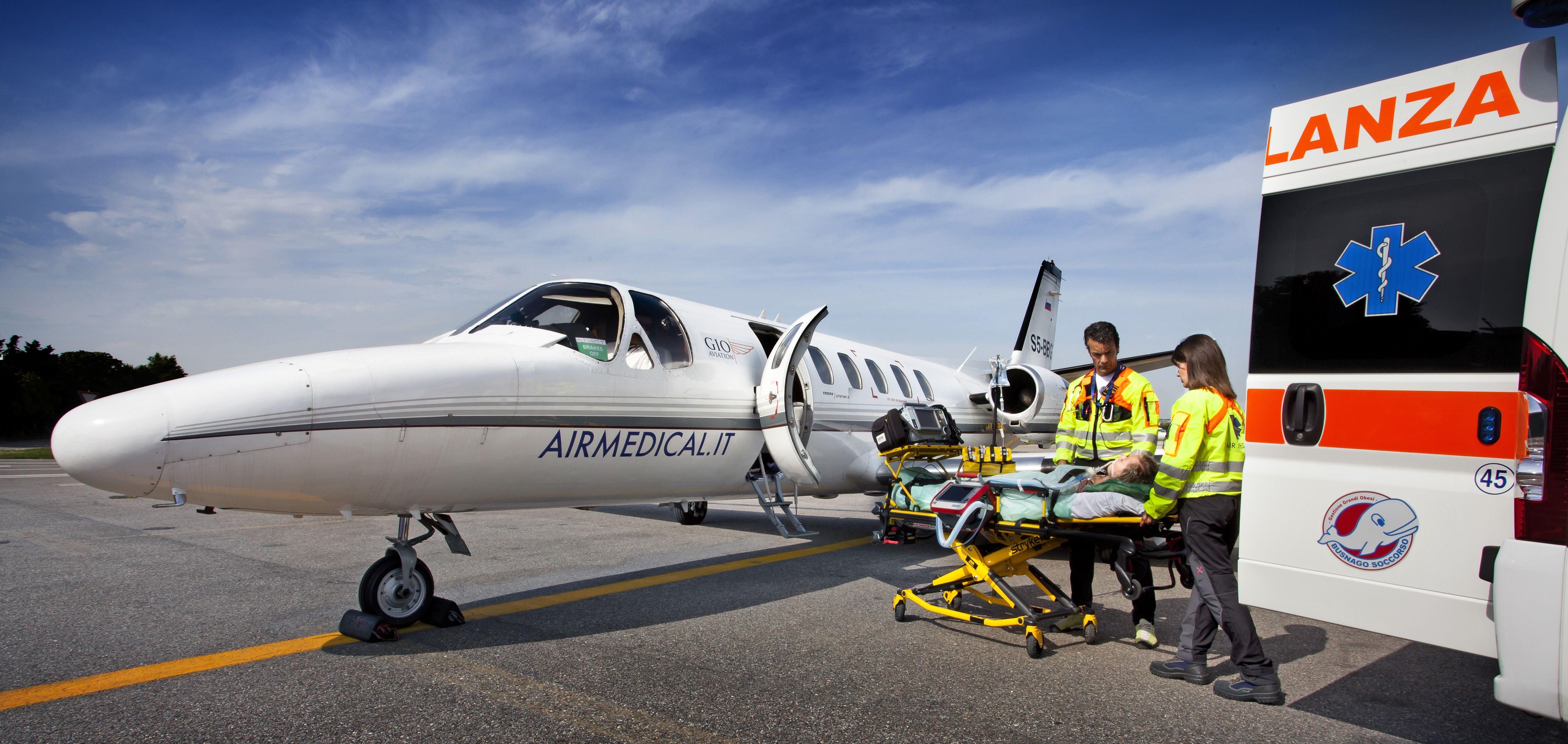 medici professionisti assistono il paziente durante il trasferimento